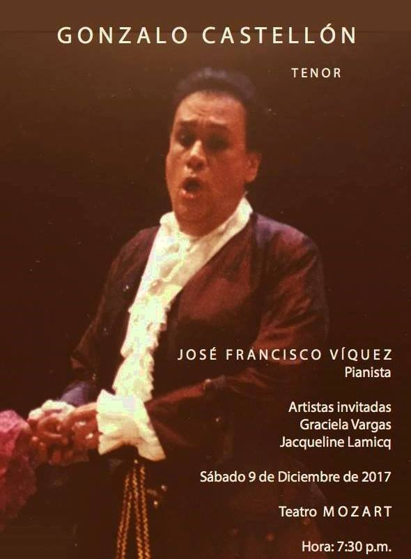 Teatro Mozart 2015. Presentación Gonzalo Castellón escritor, tenor, historiador y abogado de Costa Rica